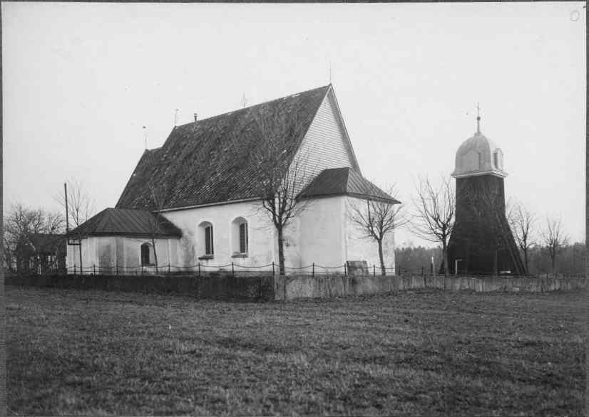 Hagshults kyrka